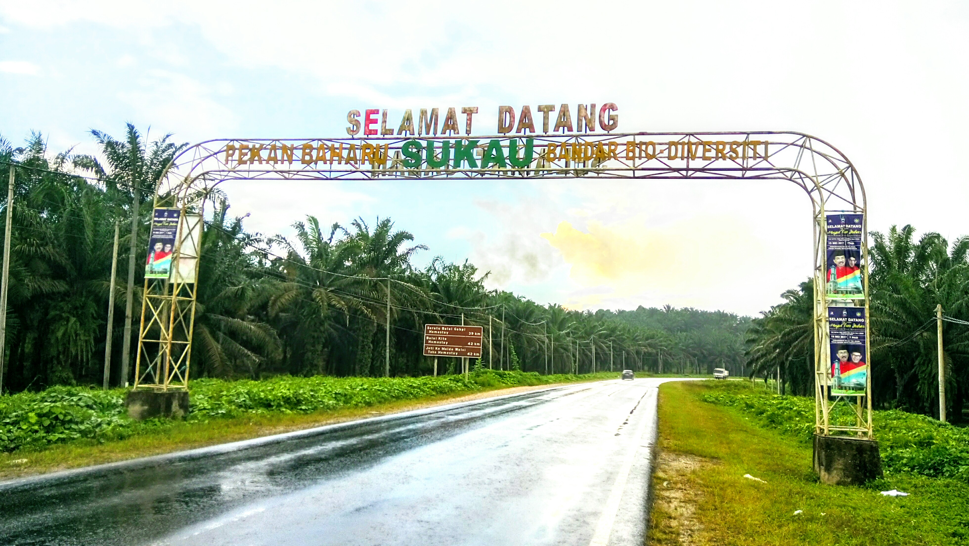 Mukim di Kinabatangan